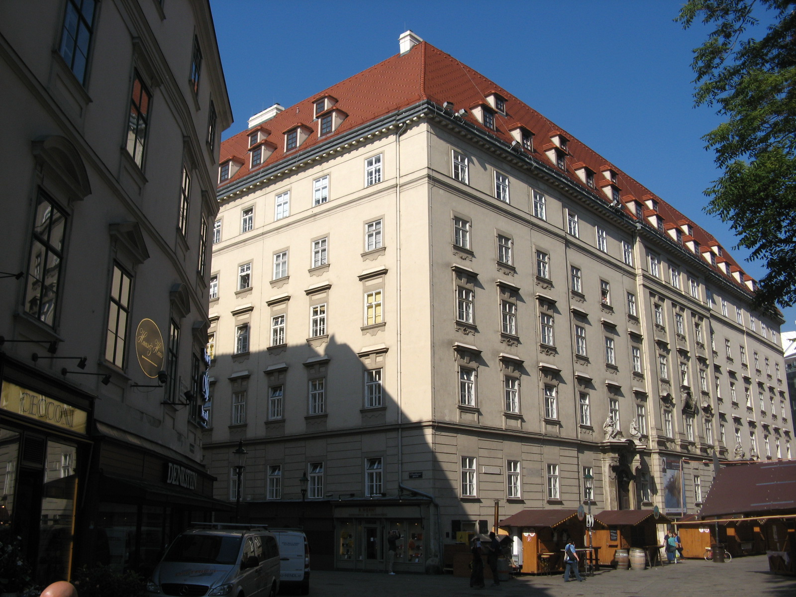 Churhausgasse, Einmündung vom Stephansplatz mit Erzbischöflichem Churhaus, Wien-Innere Stadt